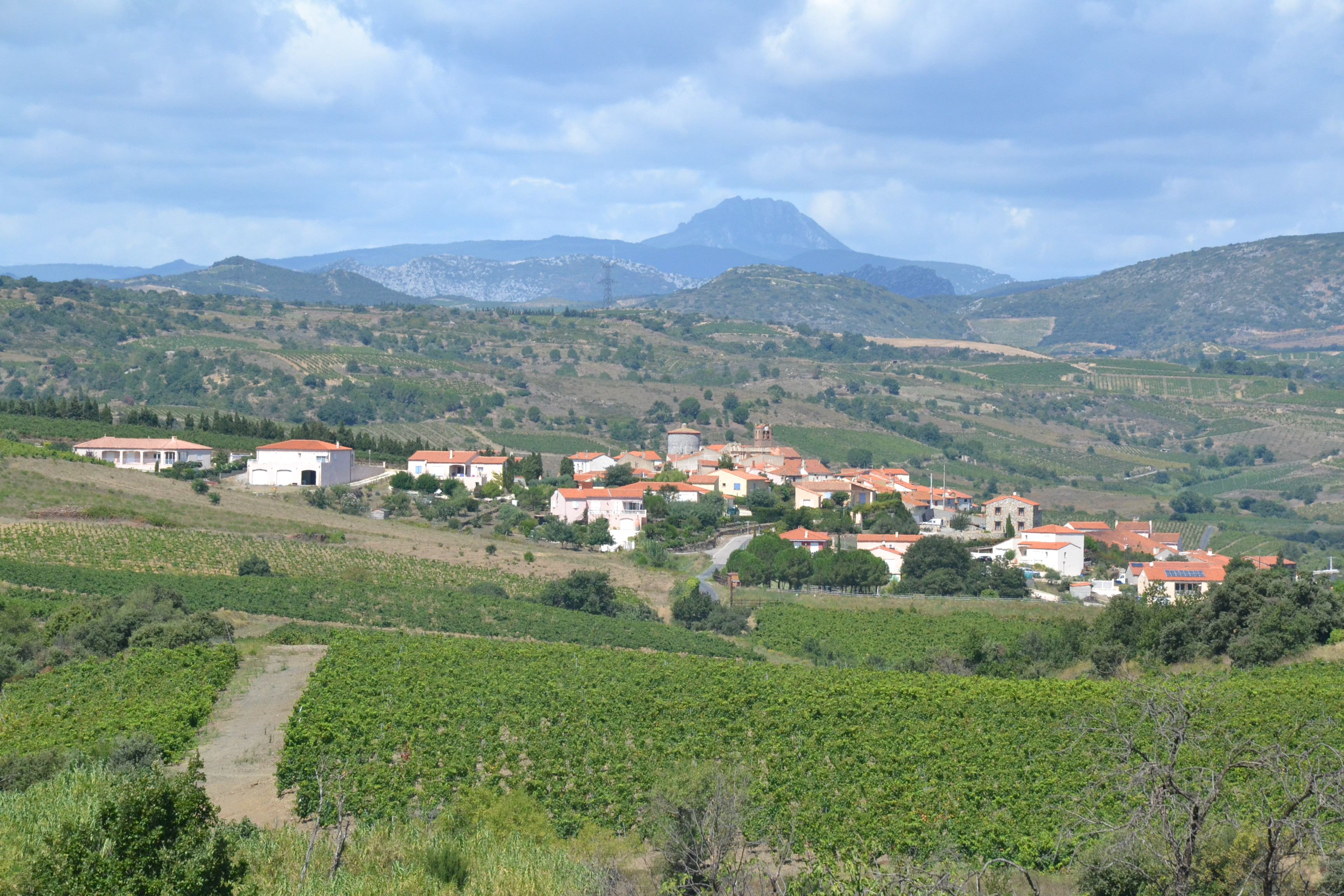 Montner (P.-O., France) et le pic de Bugarach.